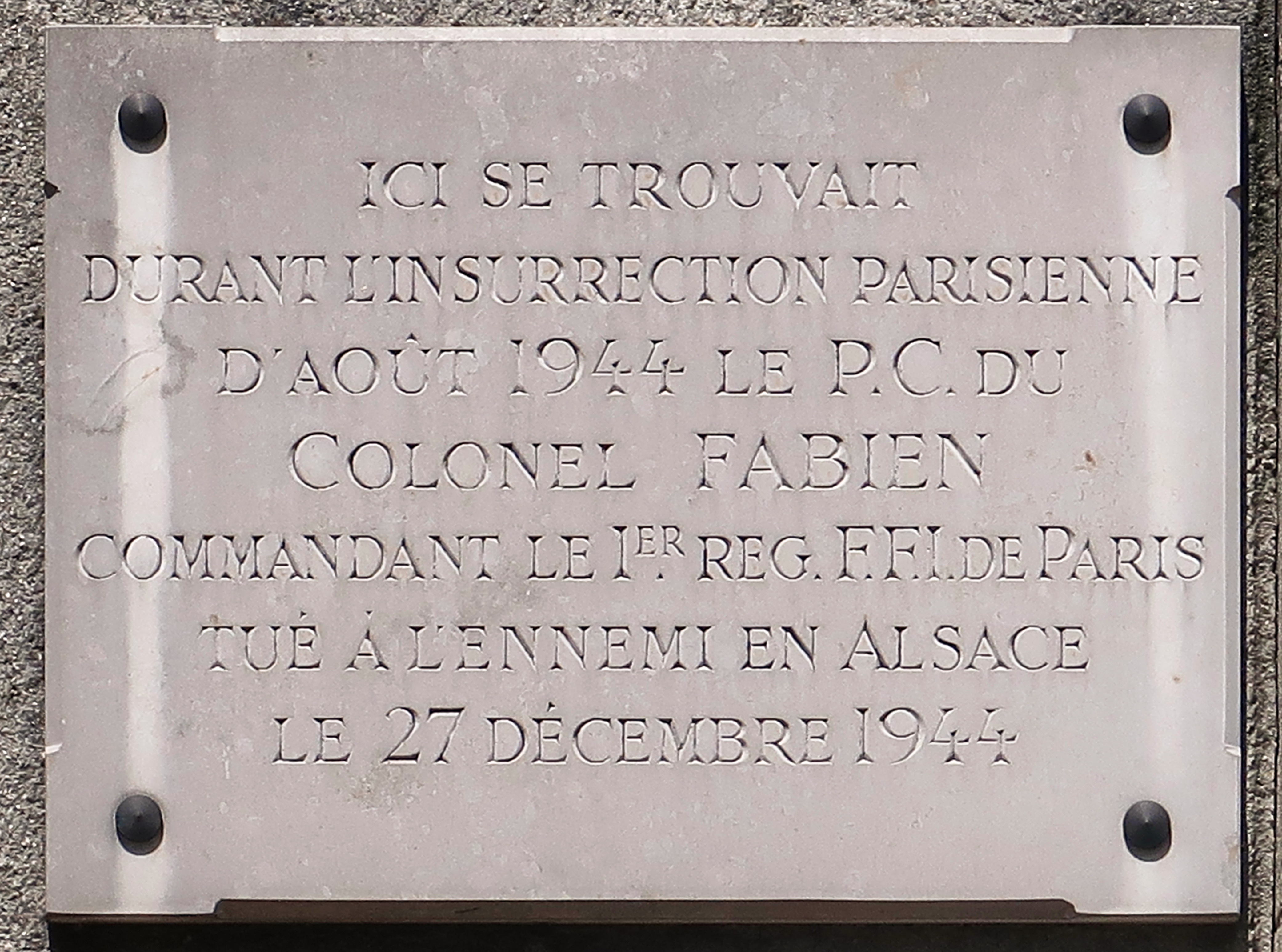 Plaque rendant hommage au colonel Fabien, qui avait, au n°12 rue de l'Abbé-de-l'Épée (Paris, 5e), son PC pendant l'insurrection de Paris de 1944.